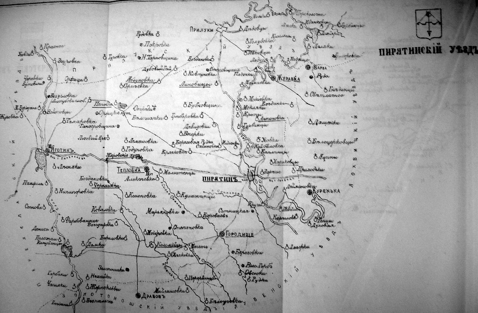 карта Пирятинського повіту